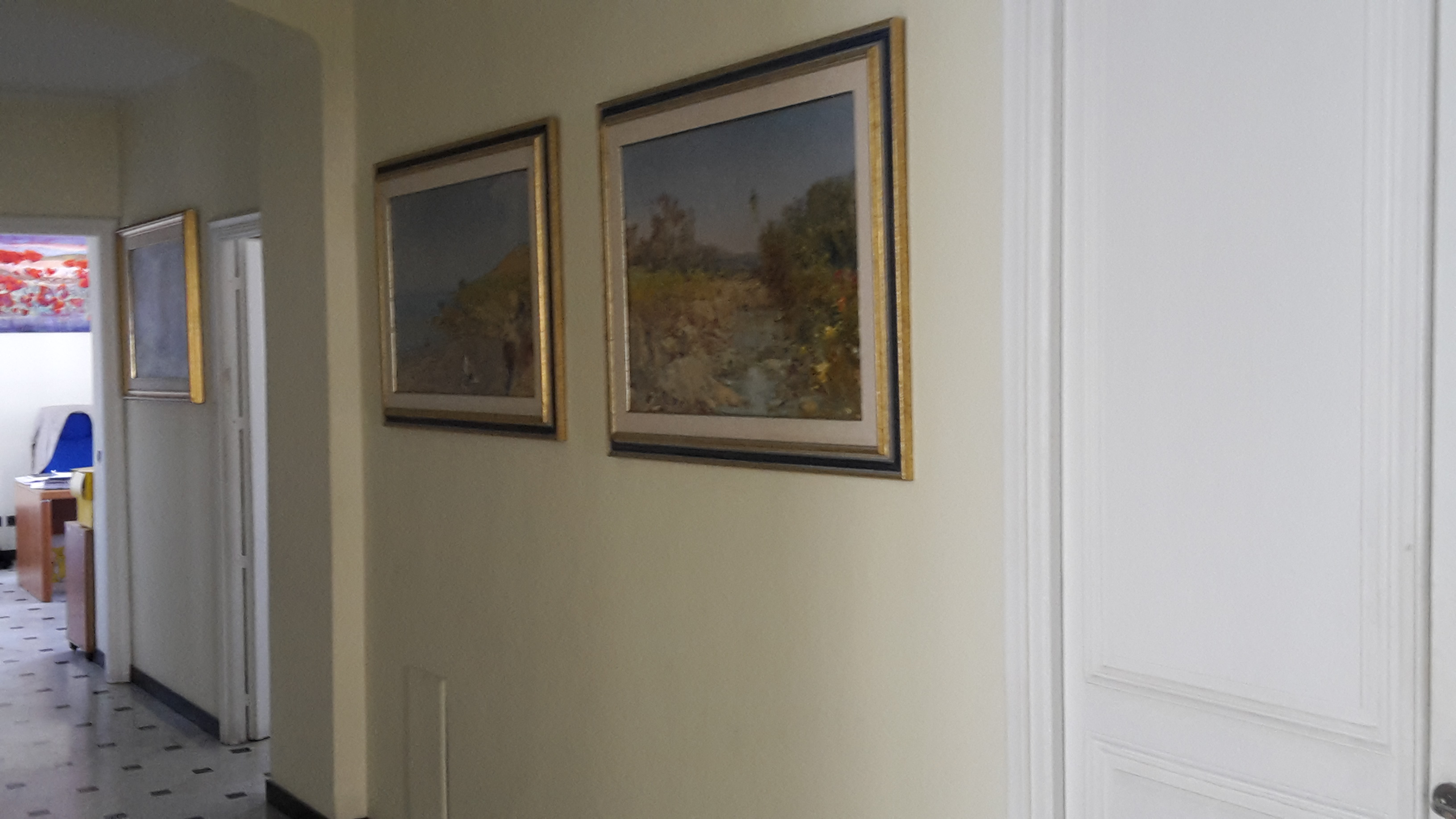 Due quadri di G. F. Piana conservati nelle sale del comune di Bordighera.